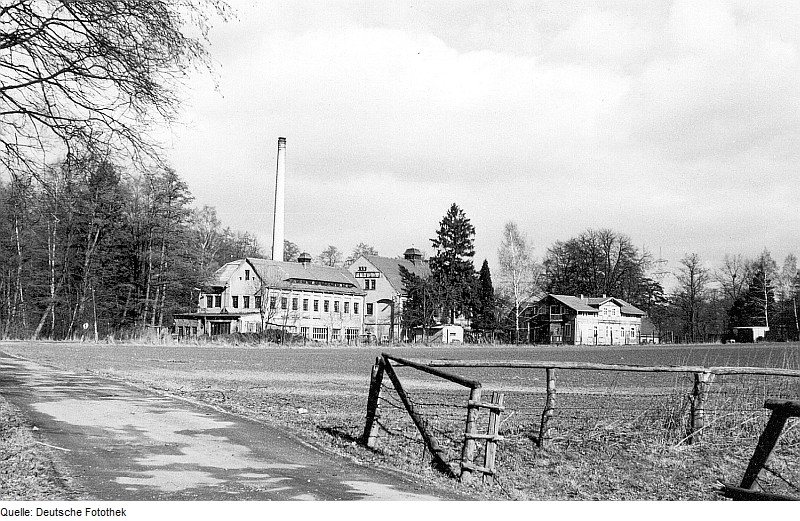 Original image description from the Deutsche Fotothek Dürrröhrsdorf-Dittersbach-Dittersbach. Ehem. Papierfabrik an der Wesenitz